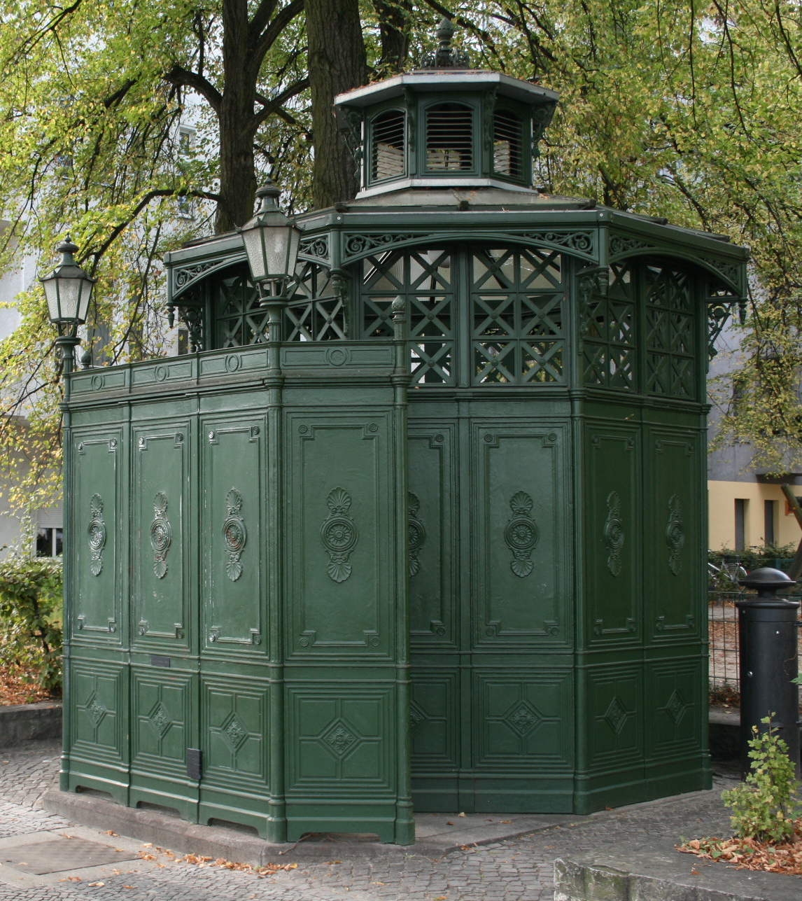 Bedürfnisanstalt in Berlin-Schöneberg Leuthener Platz